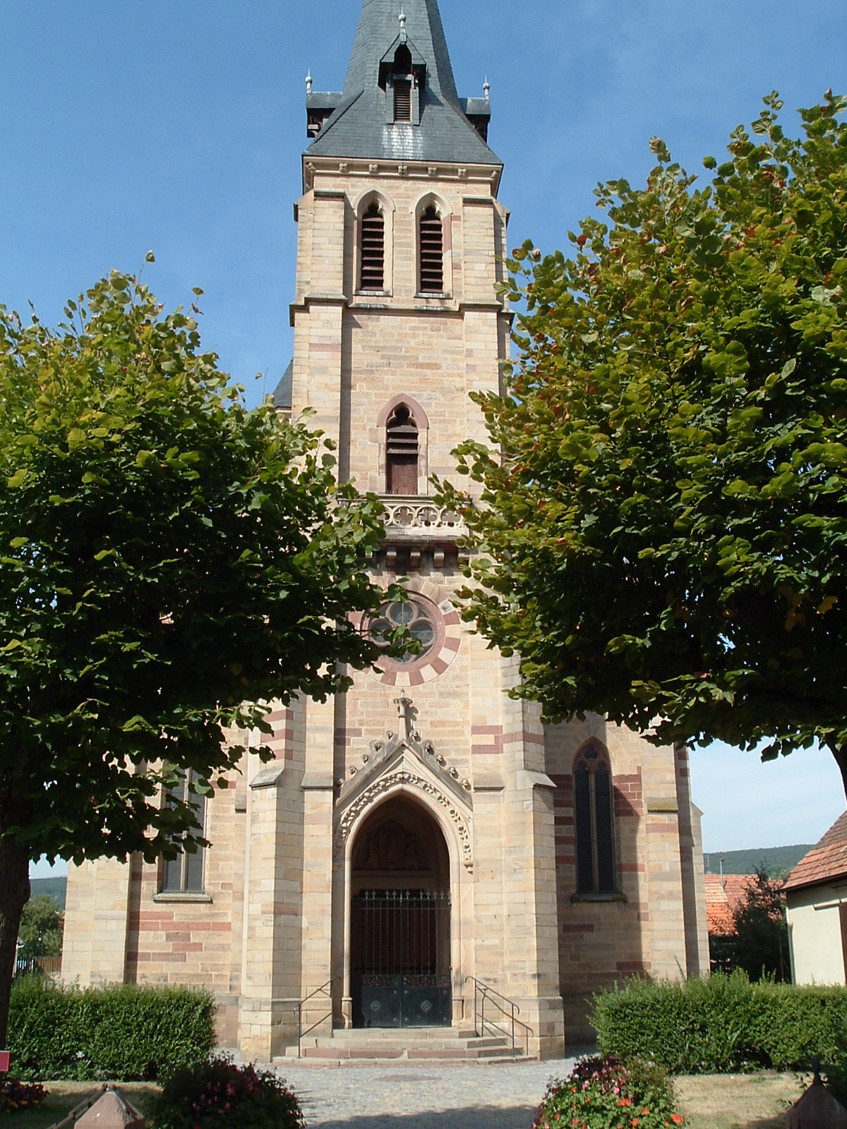 Kàtholische Kirich, Weschthoffe, Unterelsàss